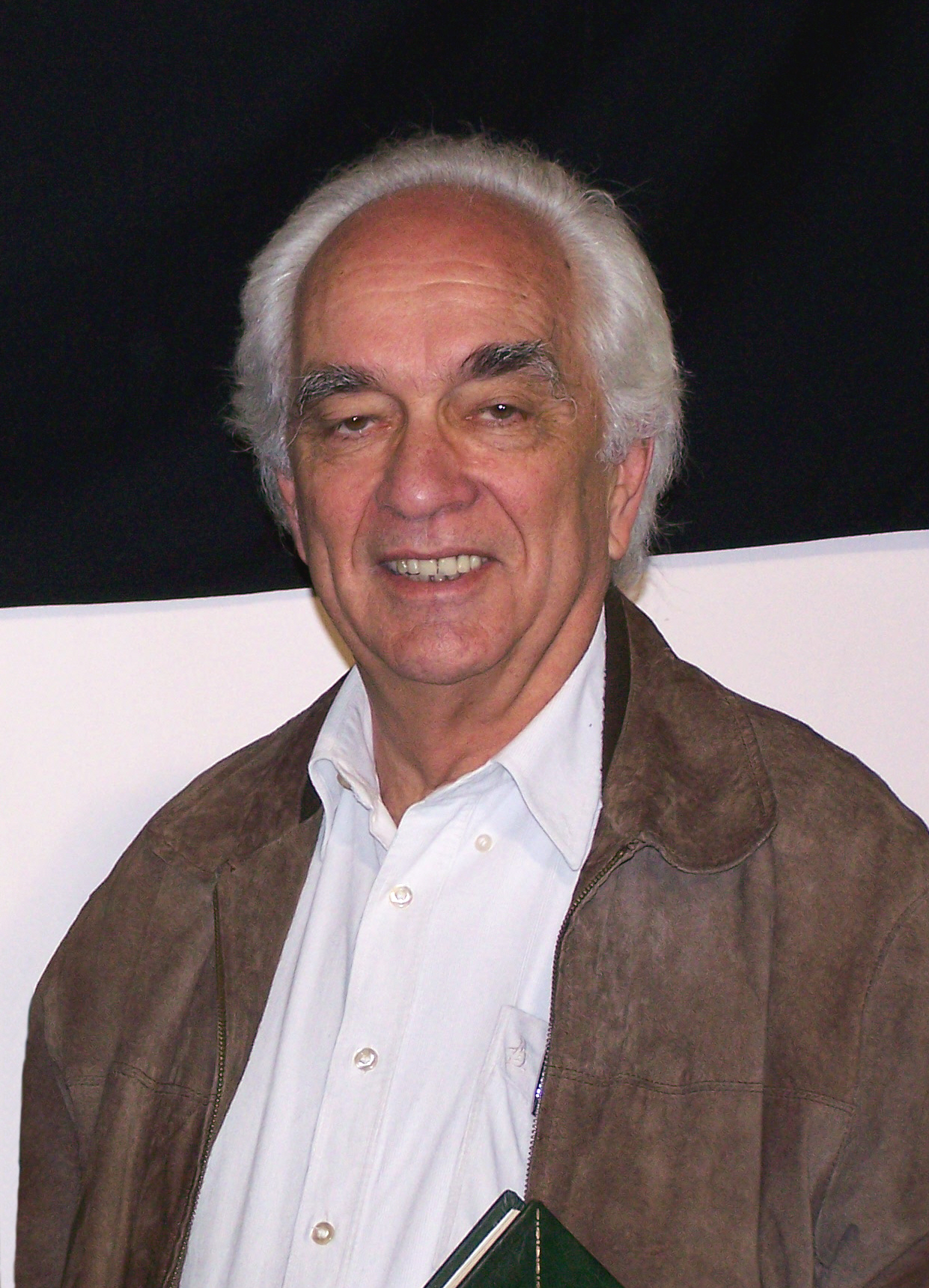 Fotografia de Jorge Brovetto ingeniero y político uruguayo.